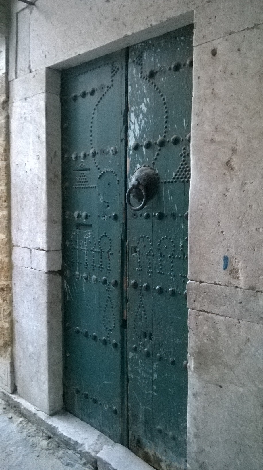 Bab Souika , Tunis باب سويقة ، تونس